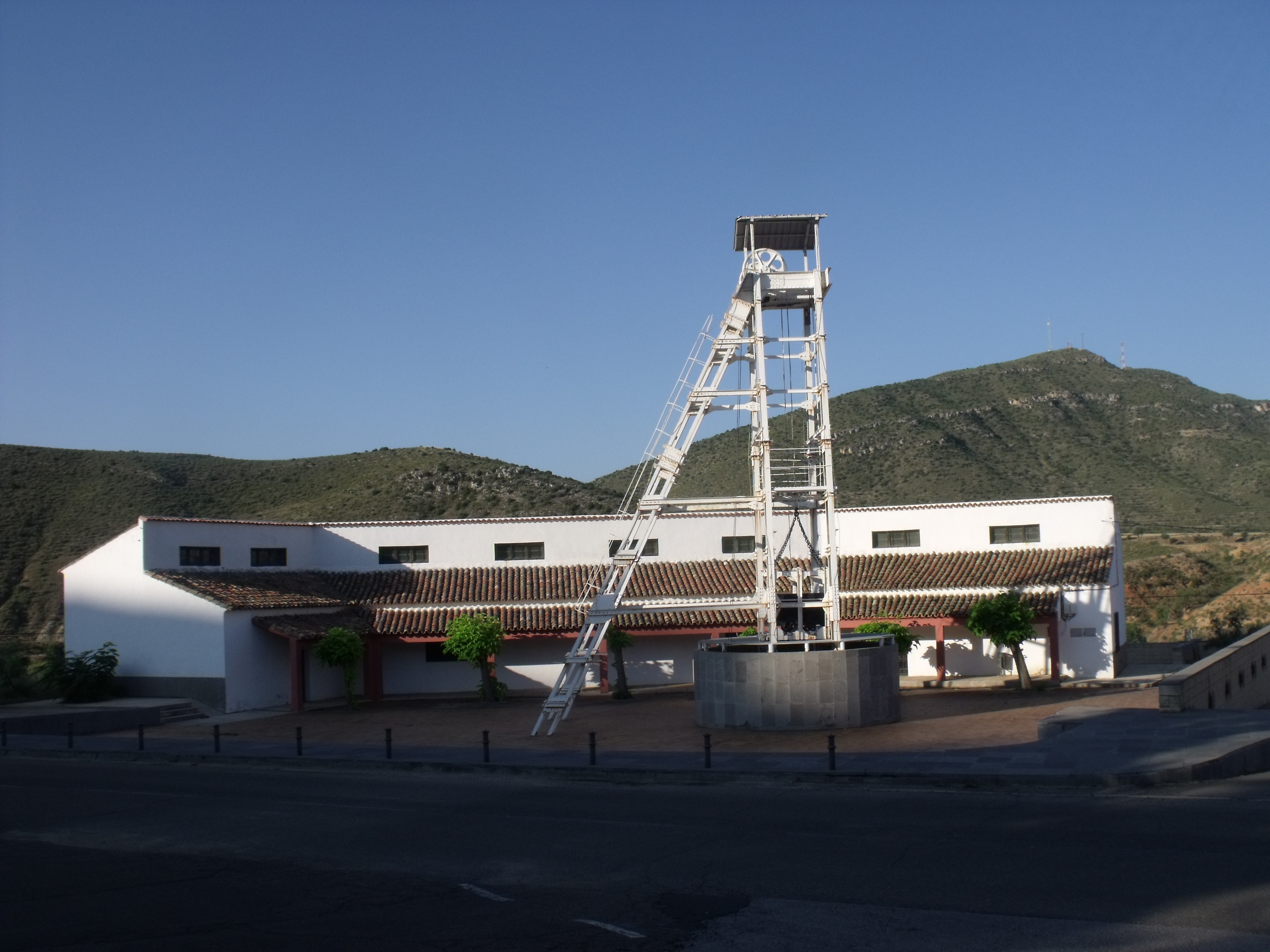 Castillete minero. Ariño (Teruel).